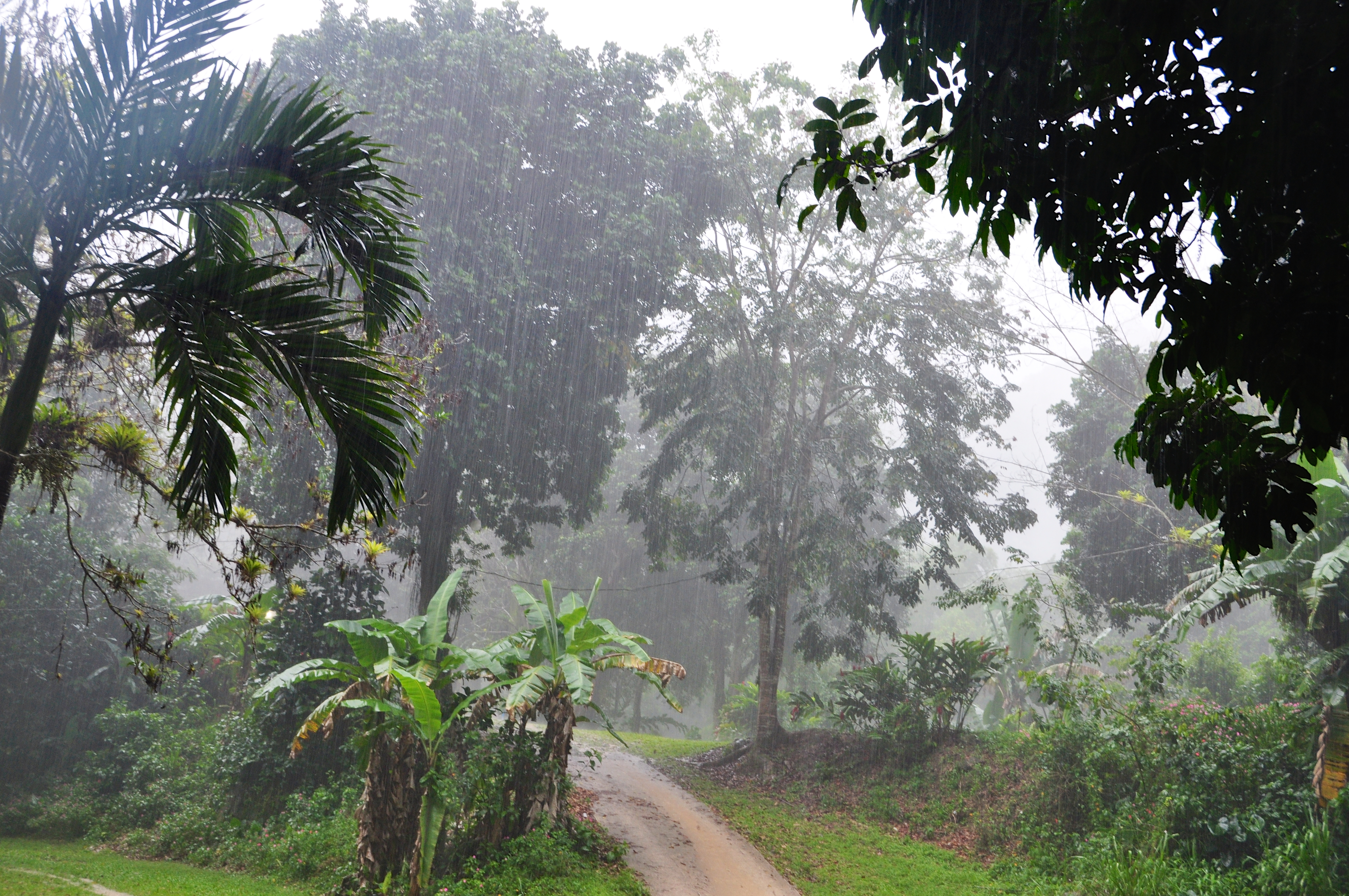 Toro Negro, Ciales, Puerto Rico